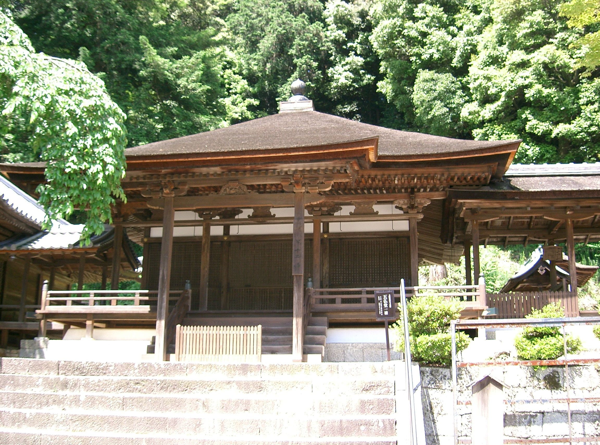 金剛寺 五仏堂